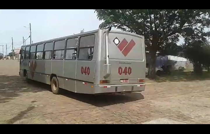 ônibus, década de 1990